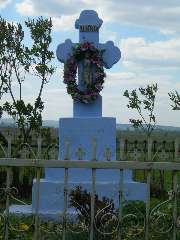 Село Великий Полюхів.Хрест 1848 року на пам"ятку про скасування панщини в Австро-Угорській Імперії.